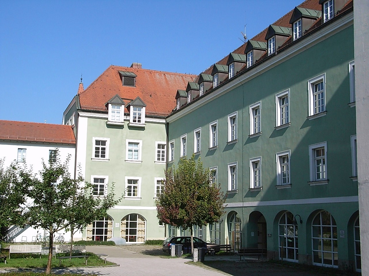 Fachoberschule Passau